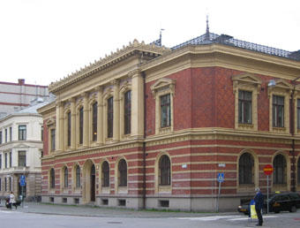 Gamla Riksbanken, Malmö